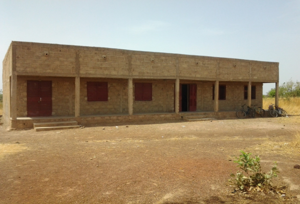 Tshivenda: Le complexe scolaire Ebenezer Yamyidgri-ziiga à Youlou en construction